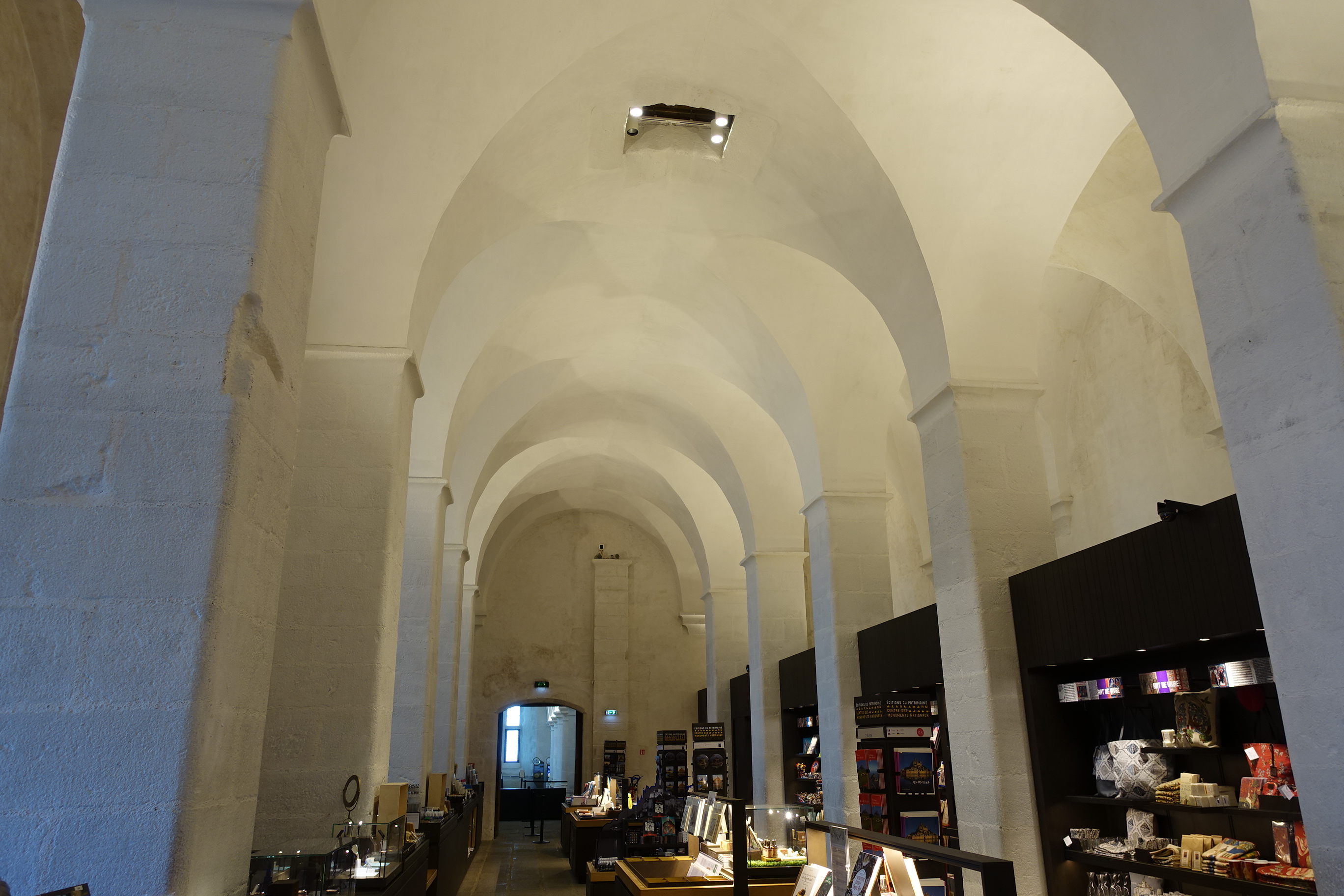 Cellier (mont Saint-Michel, la Merveille)